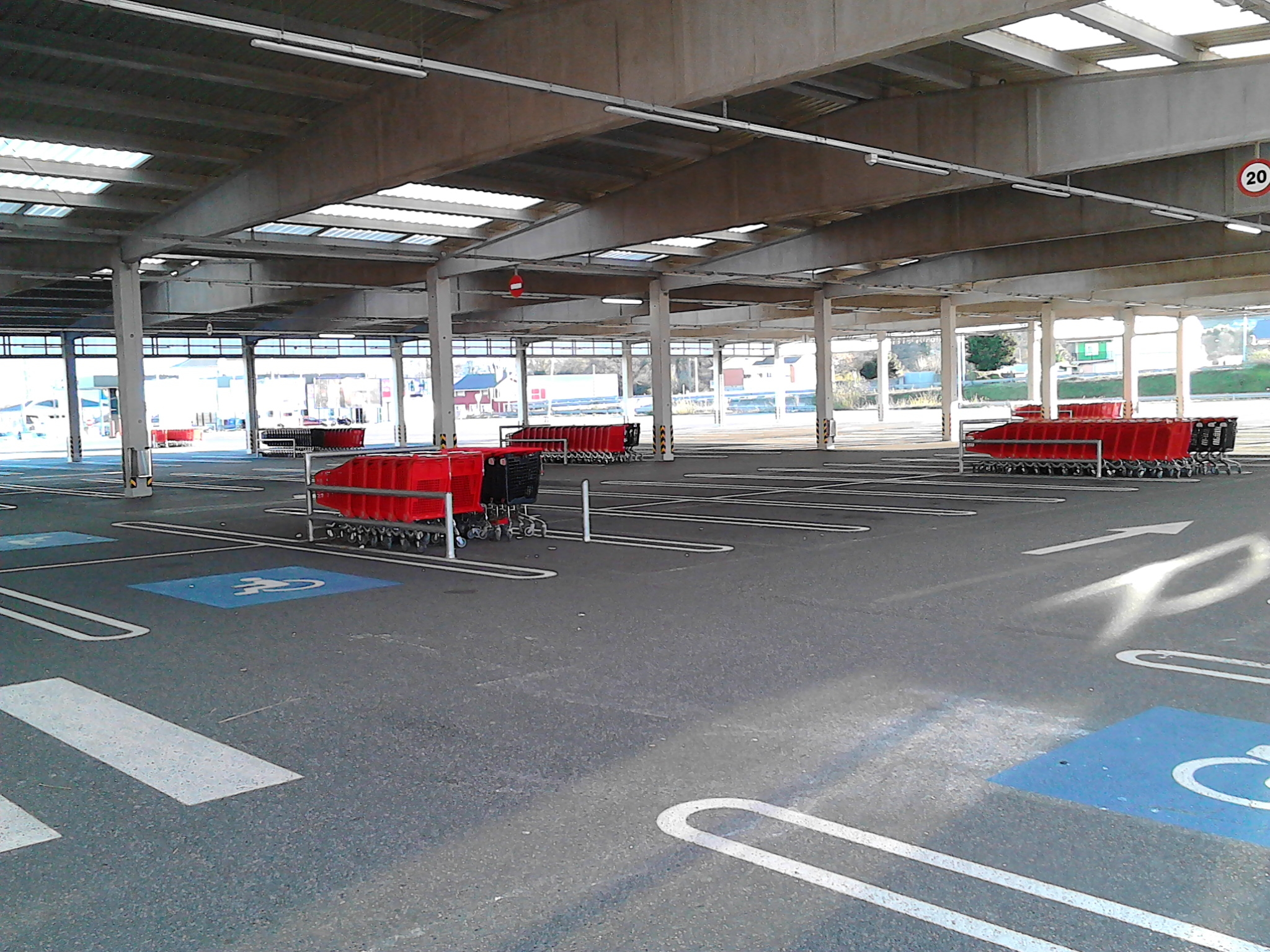 Aparcamento cuberto en Ribadeo (Eroski - Vegalsa)